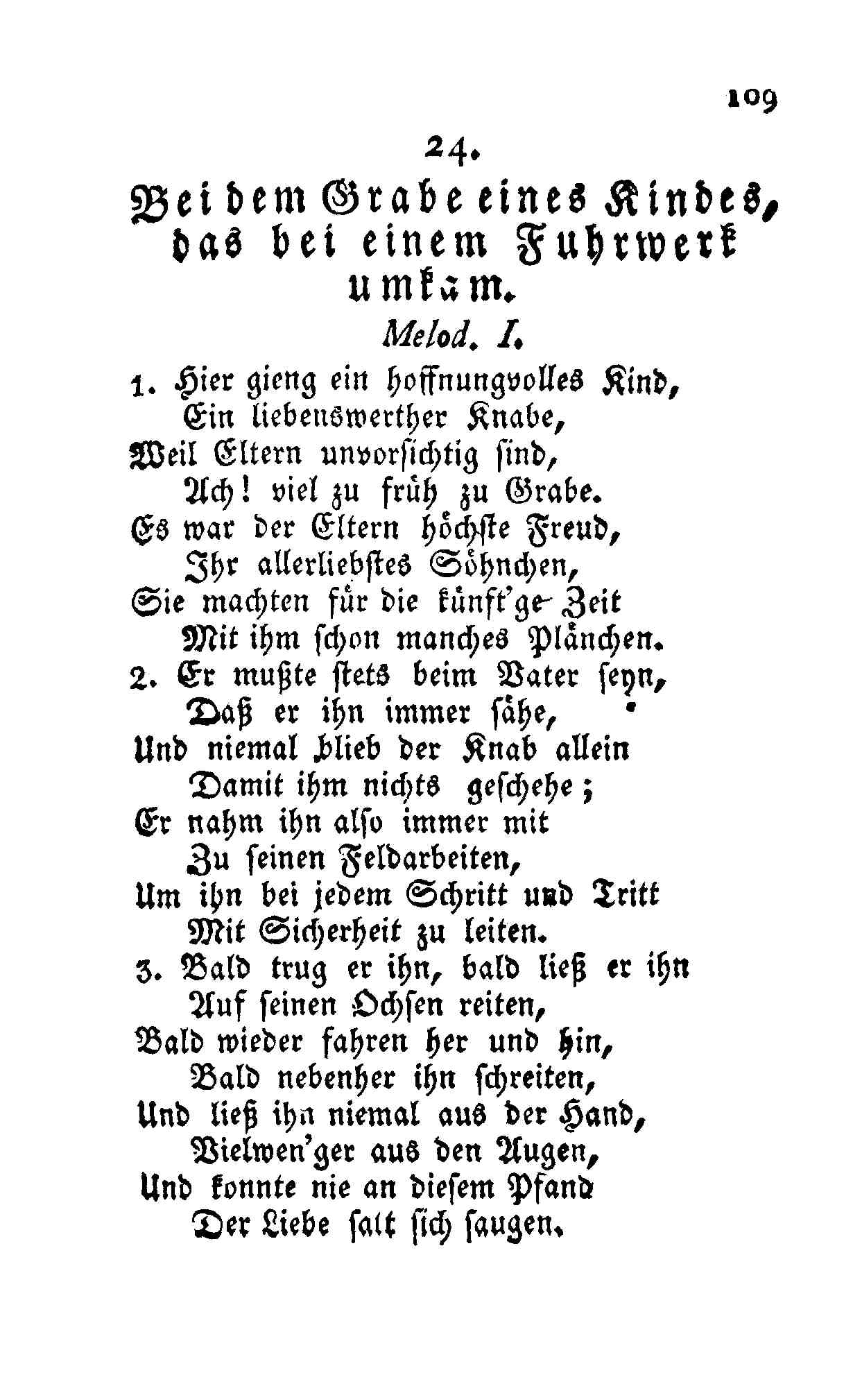 de: Michael von Jung: Melpomene oder Grablieder. Zwei Baendchen jedes hundert Grablieder enthaltend mit zwanzig Melodien.